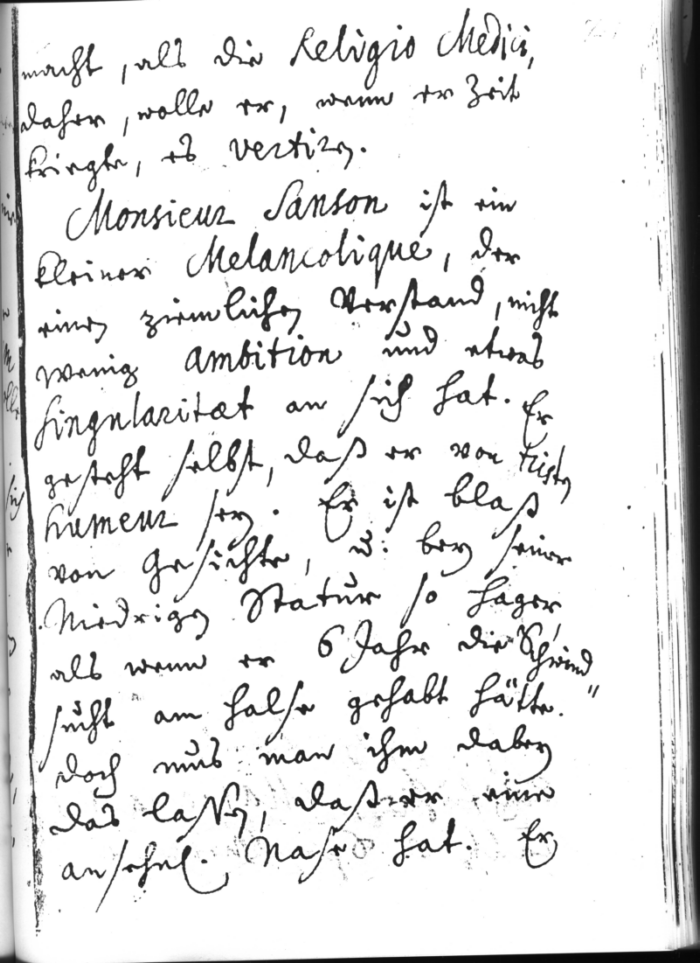 Gottlieb Stolle, Reisebericht, 1703, Seite 721.